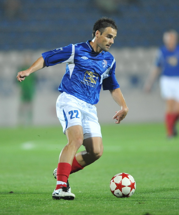 Желько Любенович — сербский футболист.